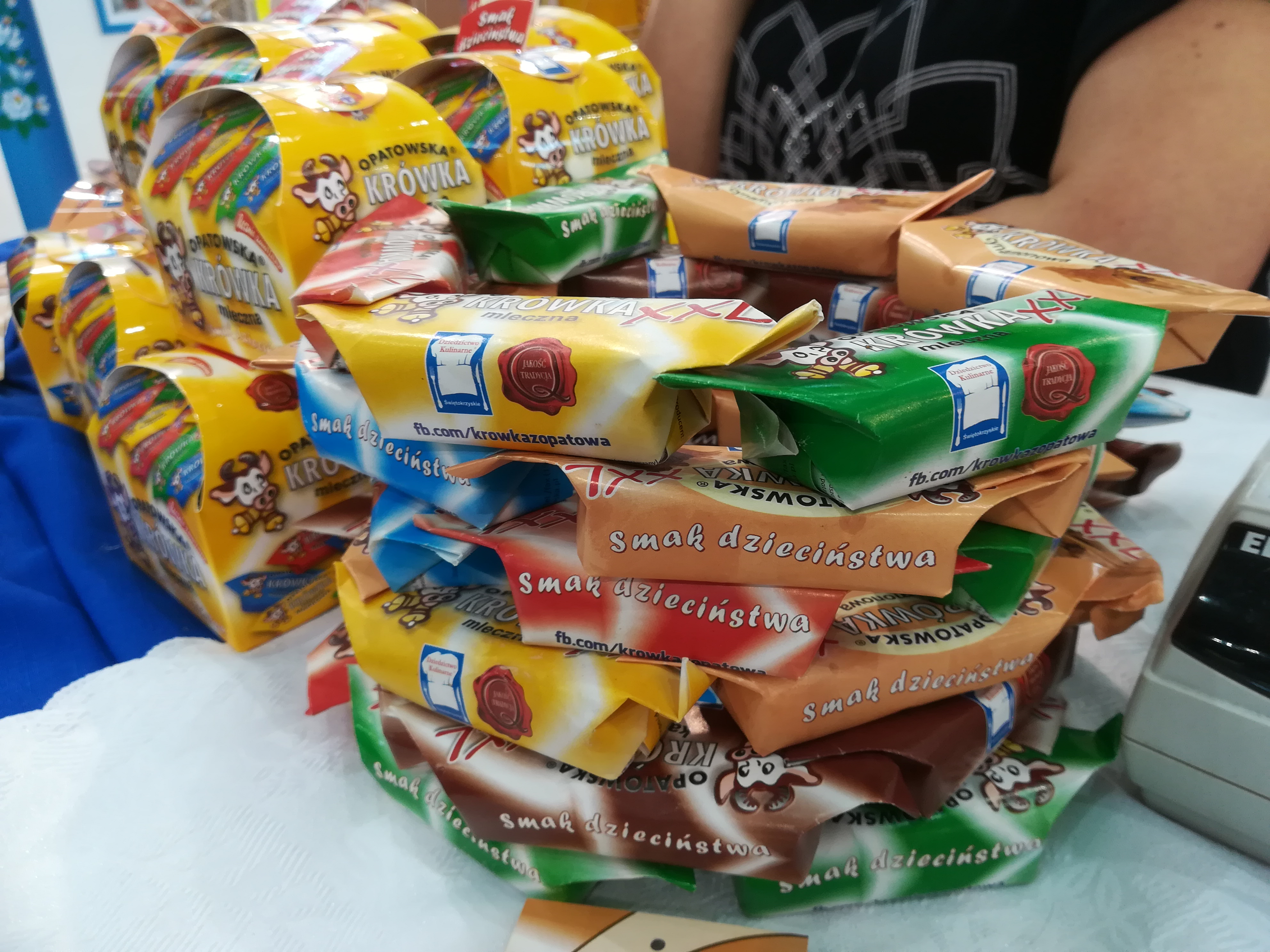 Targi Smaki Regionów - Poznań 2019 r. Krówka opatowska.